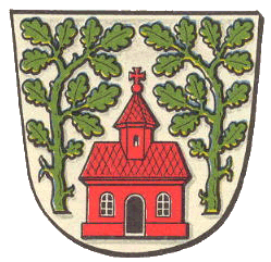 Wappen von Götzenhain, Stadtteil von Dreieich